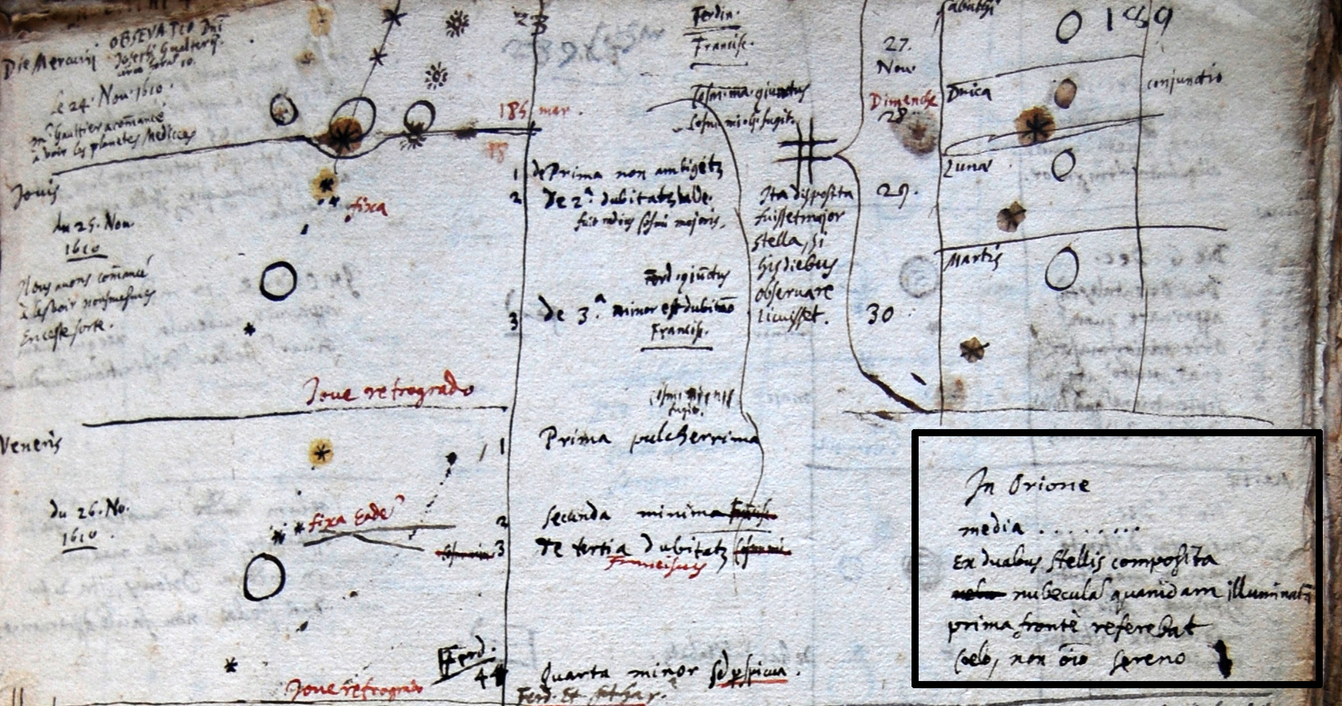 Photo d'une page des manuscrits de N.-C. Peiresc réalisée et retaillée par Malburet